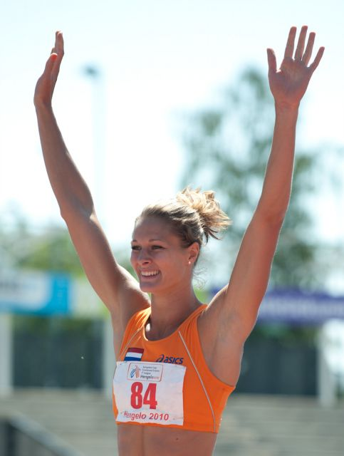 Remona Fransen tijdens het EC Meerkamp 2010 (dag2)